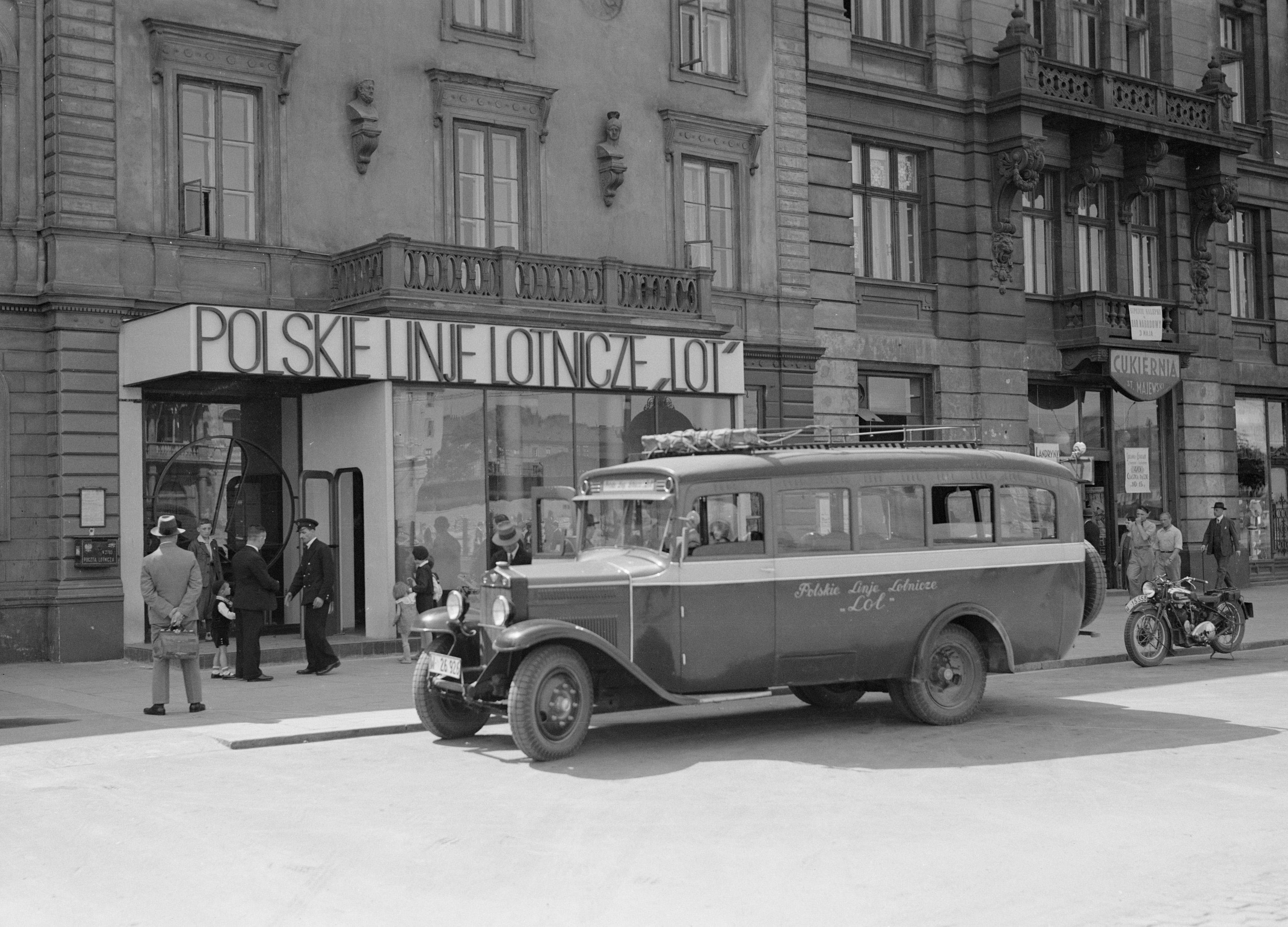 Collectie / Archief : Fotocollectie Van de Poll Reportage / Serie : Reis naar Polen Beschrijving : Bus voor het gebouw van de Poolse luchtvaartmaatschappij LOT in Warschau in Polen Datum : 1934 Locatie : Polen, Warschau Trefwoorden : autobussen, luchtvaartmaatschappijen Fotograaf : Poll, Willem van de, [onbekend] Auteursrechthebbende : Nationaal Archief Materiaalsoort : Glasnegatief Nummer archiefinventaris : bekijk toegang 2.24.14.02 Bestanddeelnummer : 190-0023